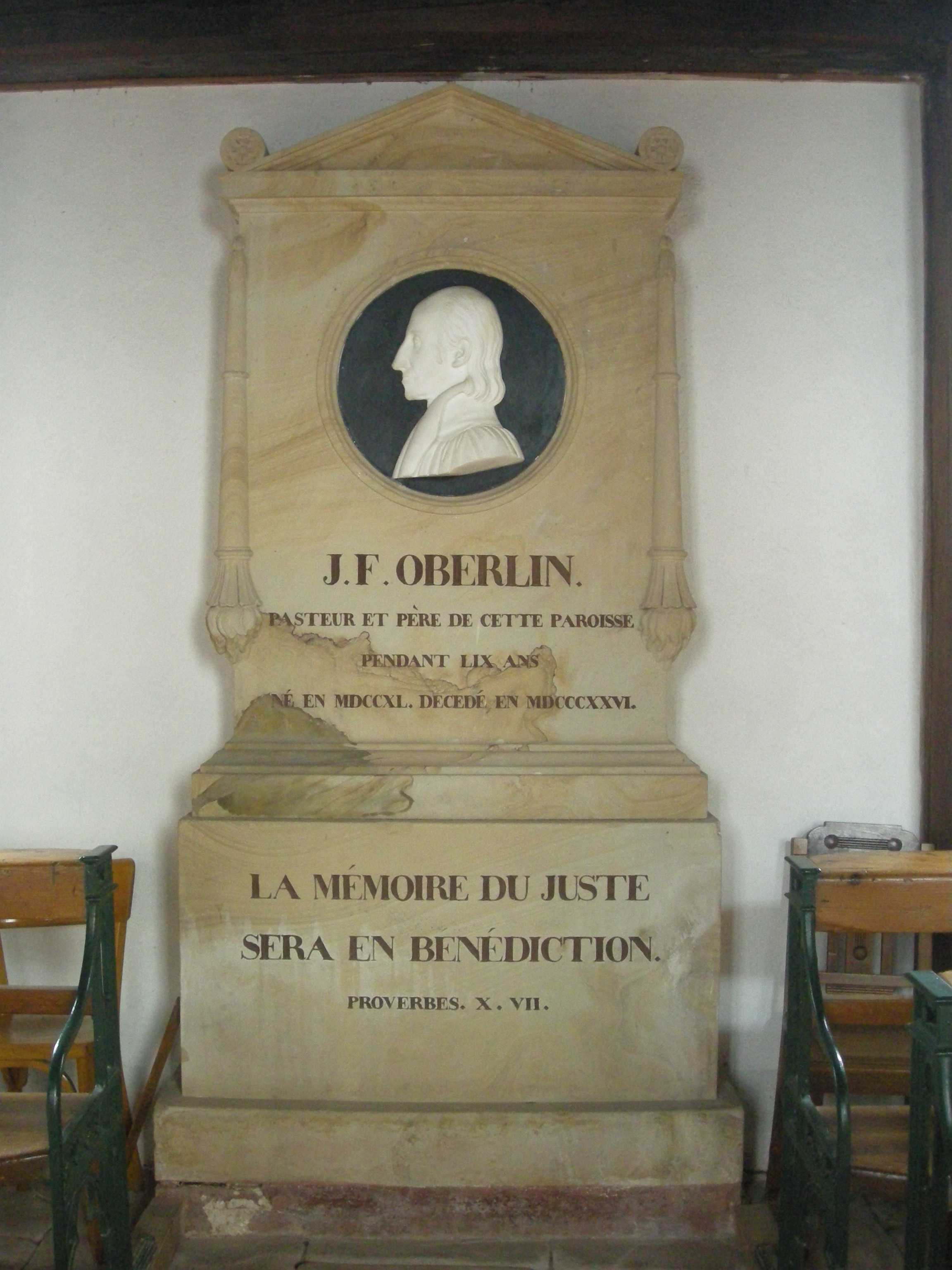 Stèle en hommage au pasteur Jean-Frédéric Oberlin dans l'église de Waldersbach (Bas-Rhin). Effigie de Landolin Ohmacht.